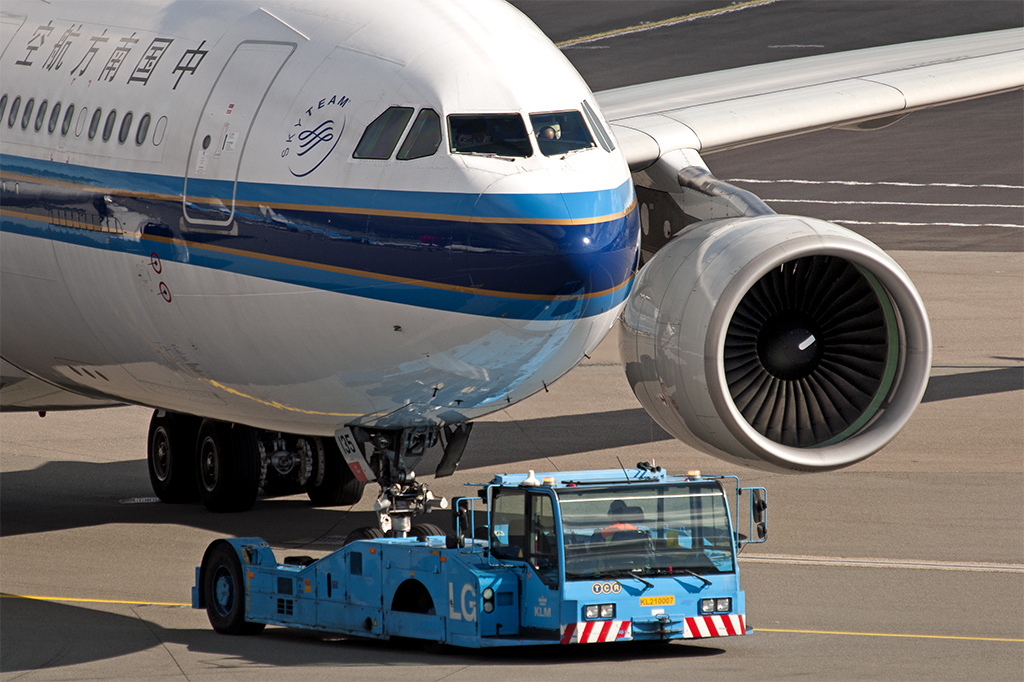 Amsterdam - Schiphol [AMS / EHAM] 7-10-2012